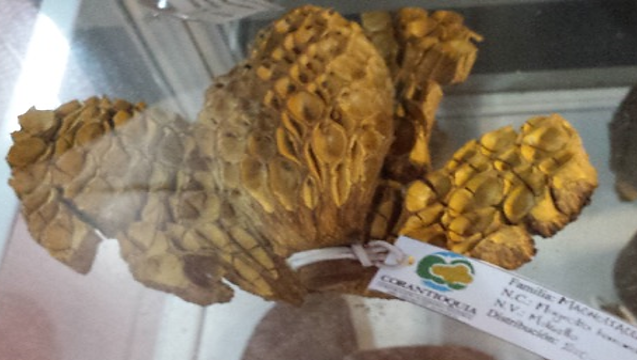 M hernandezzi